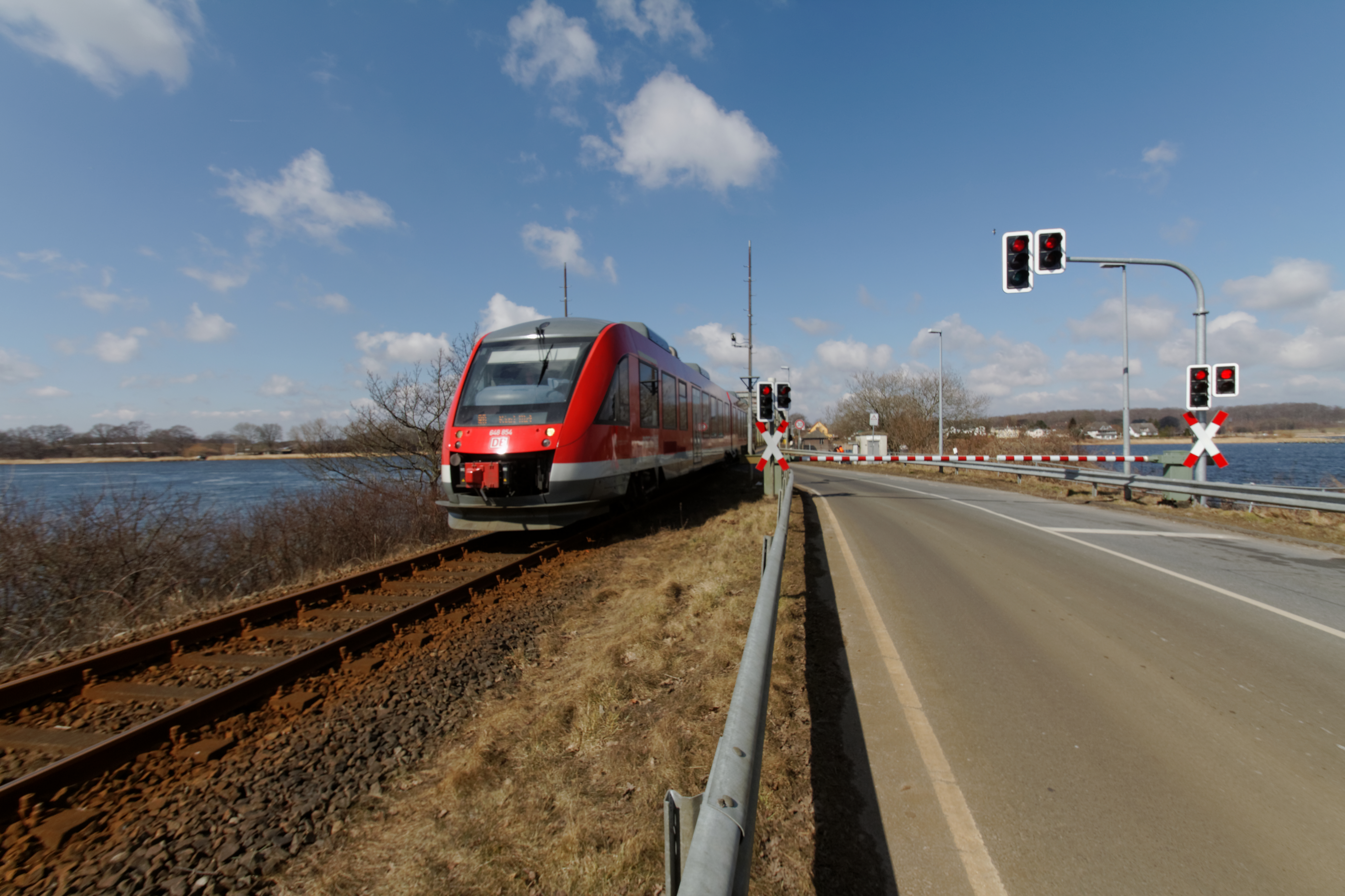 Regionnalzug Lindaunis Schlei-Hebebrücke; Strecke Kiel - Flensburg